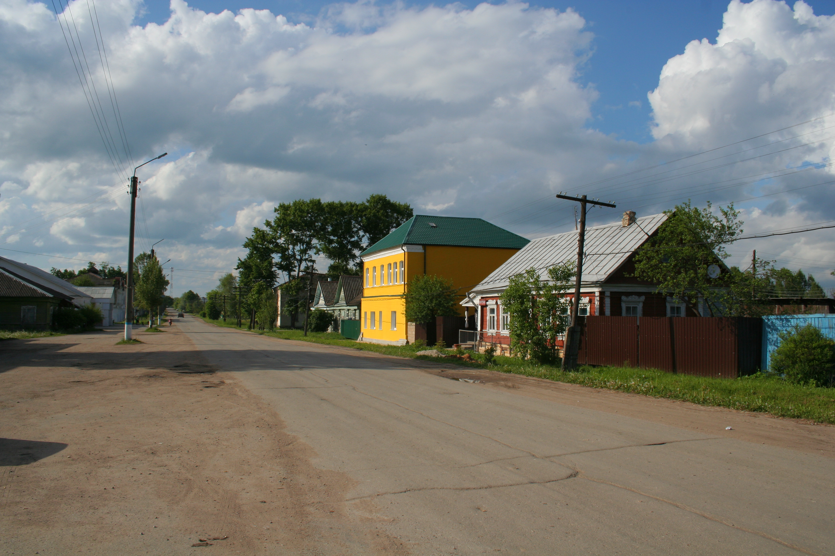 Siedlung Mjatlewo, Oblast Kaluga, Russland. Ortskern.